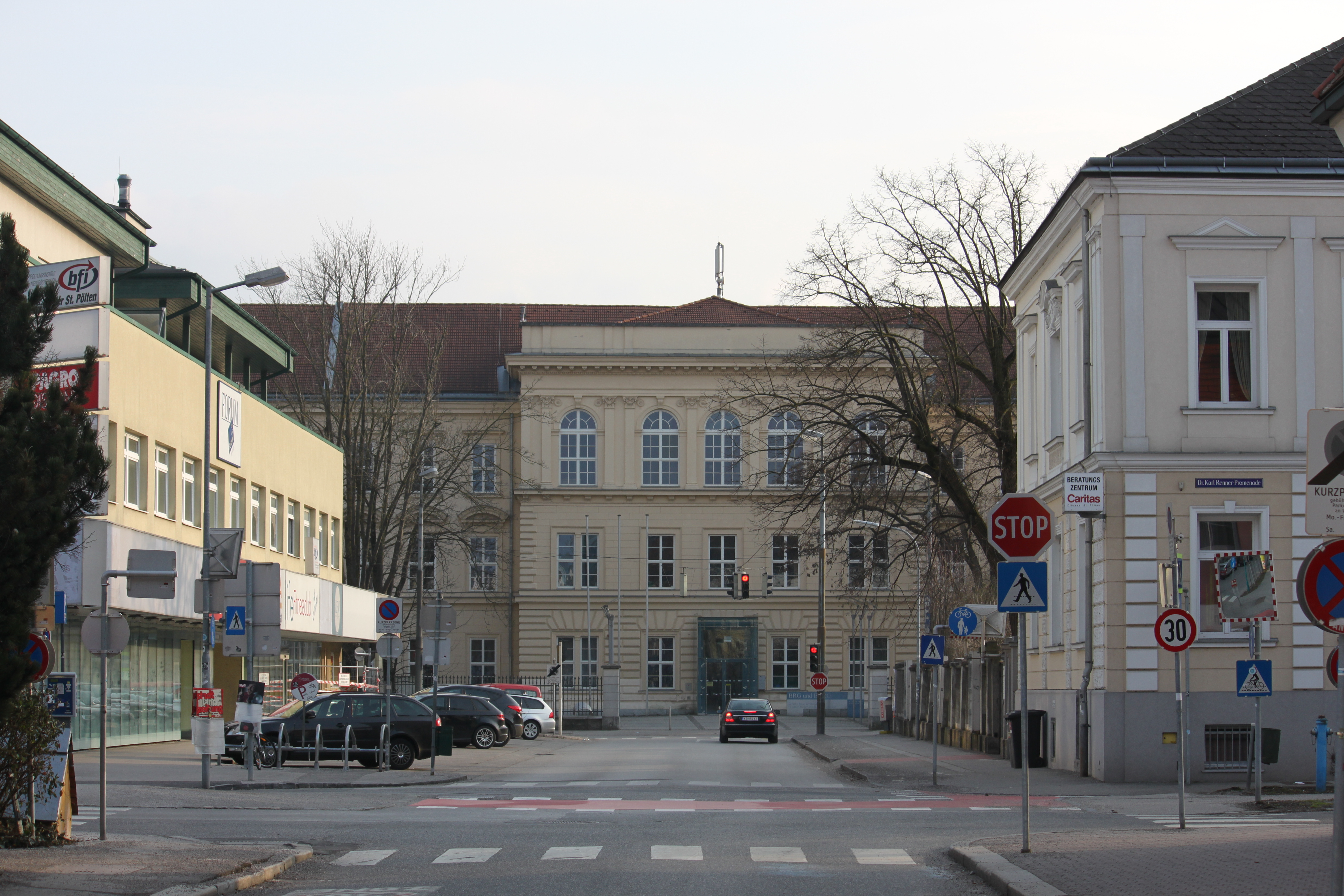 Bundesrealgymnasium und Bundesoberstufenrealgymnasium St. Pölten, Hauptfront, mittig, mit Portal, aus der Schulgasse